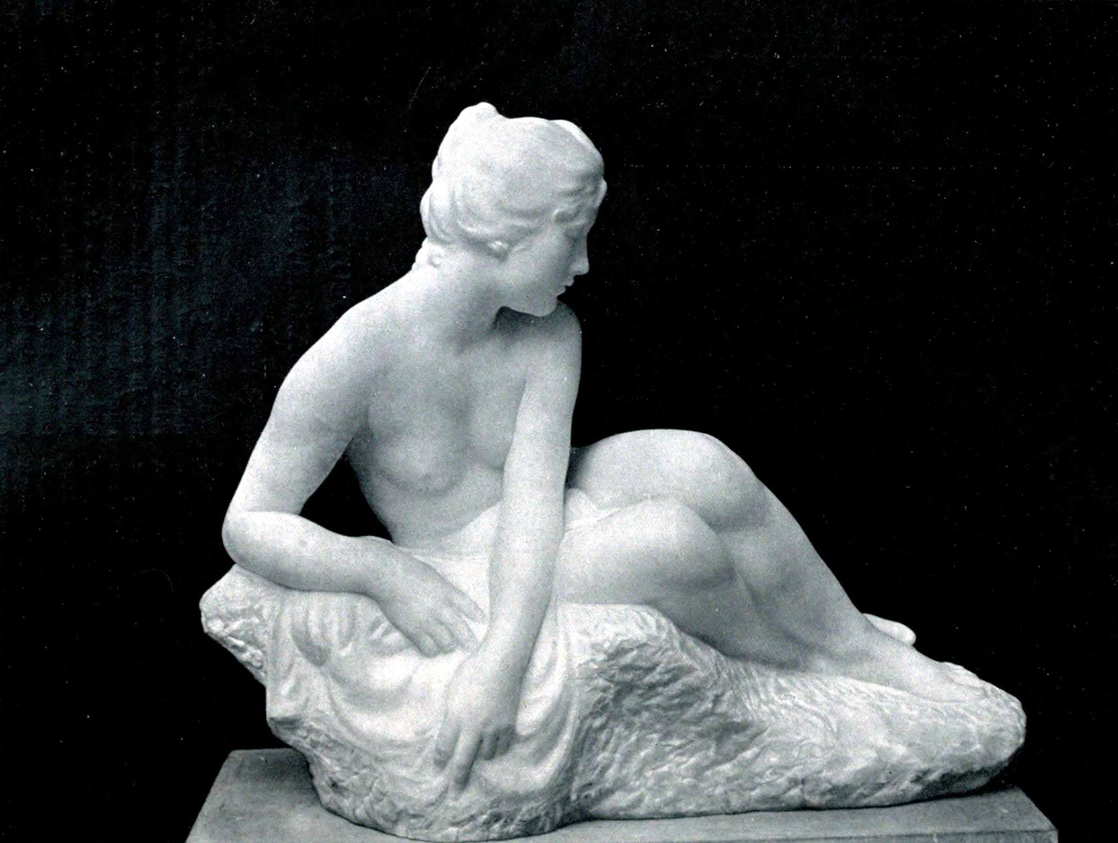 Suzanne